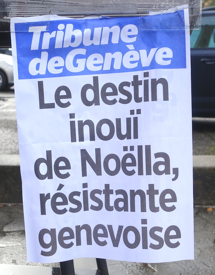 Manchette de la Tribune de Genève : « Le destin inouï de Noëlla, résistante genevoise », 24.12.2019, centre commercial au Petit-Lancy.